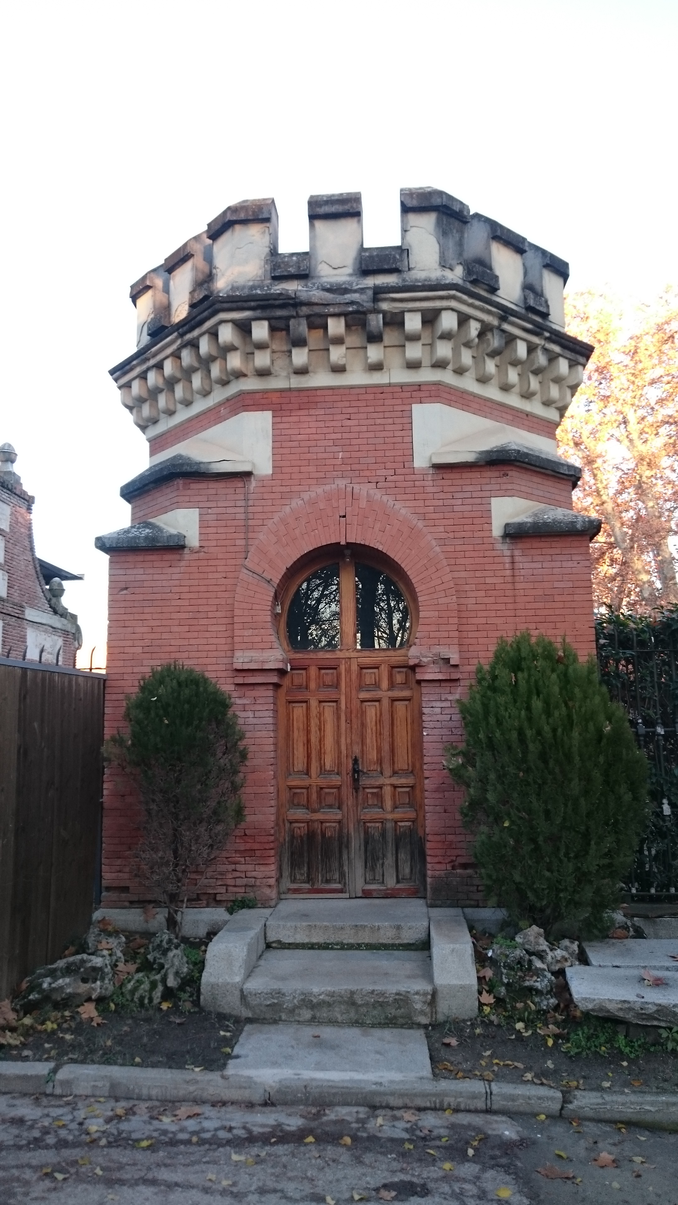 Edificio de la Guardia situado en el Reservado Grande de la Casa de Campo de Madrid, justo a la derecha de la entrada